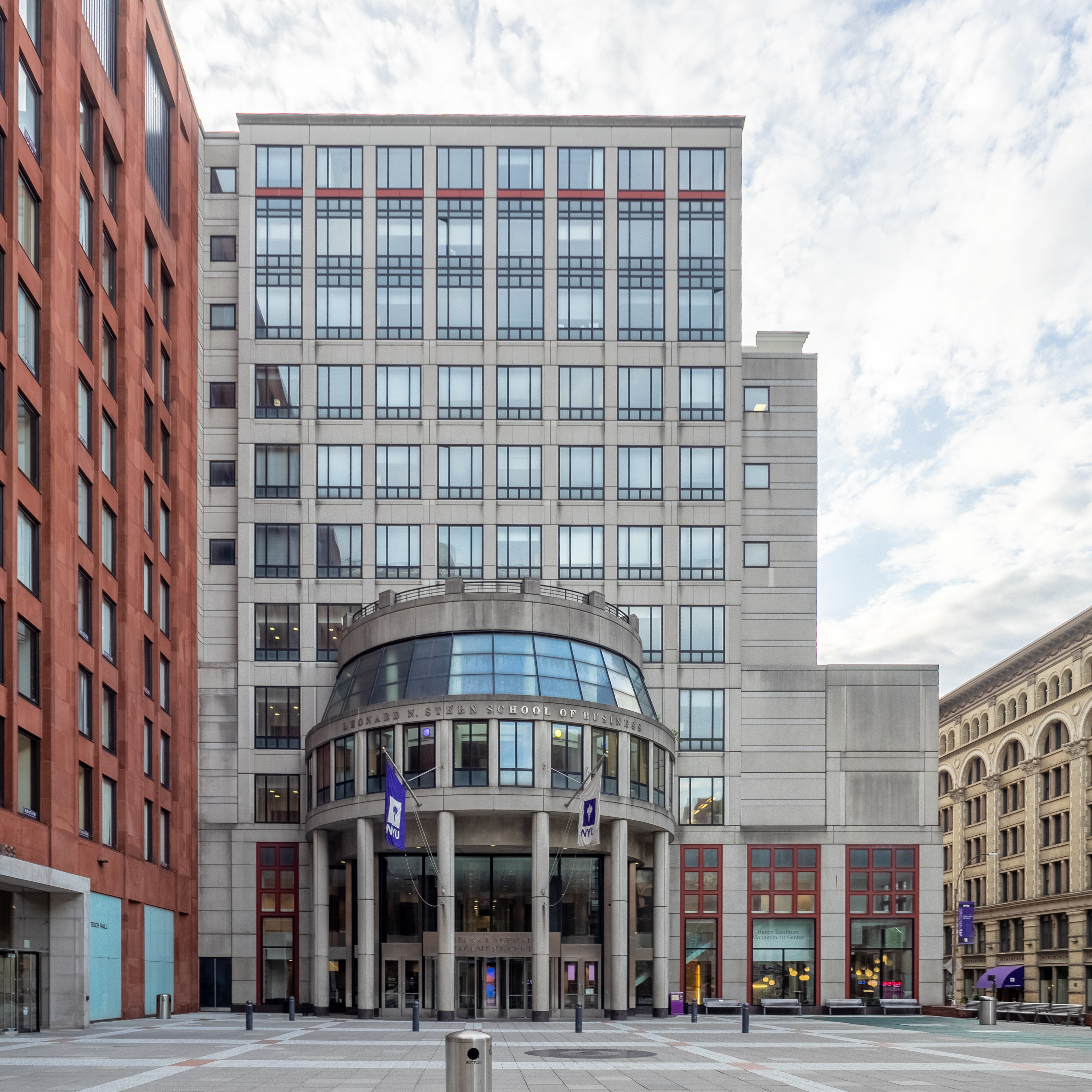 NYU, Greenwich Village, NYC